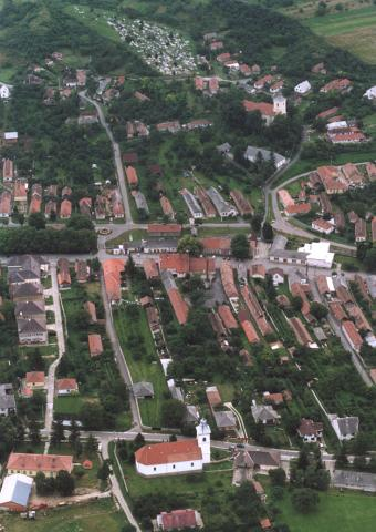 Gönc, Hungary, aerialphotogrpahy